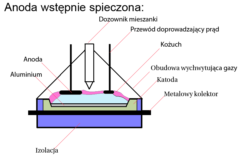 Anoda wstępnie spieczona PROCES: HALL-HÉROULT